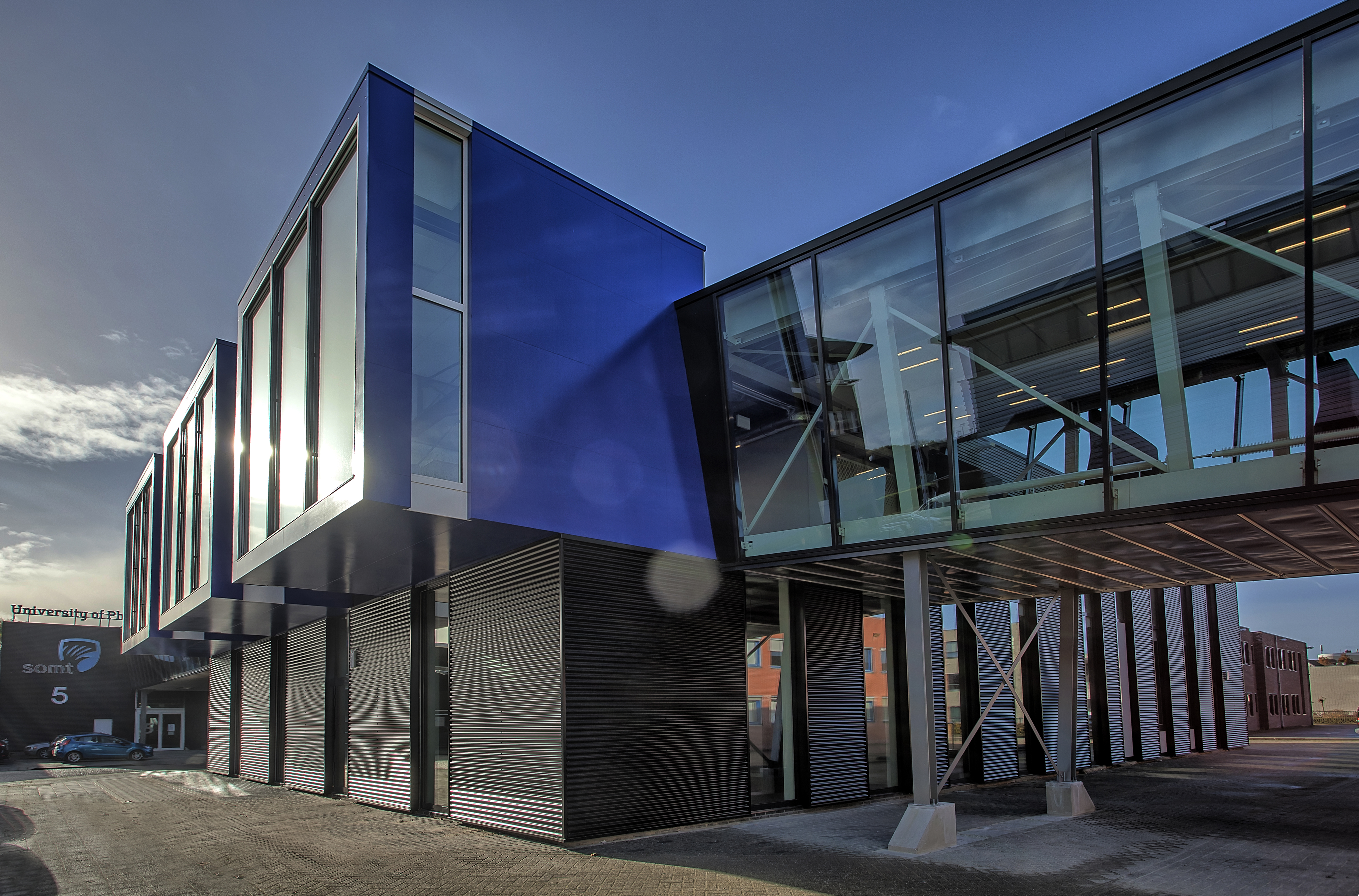 Entree van de campus